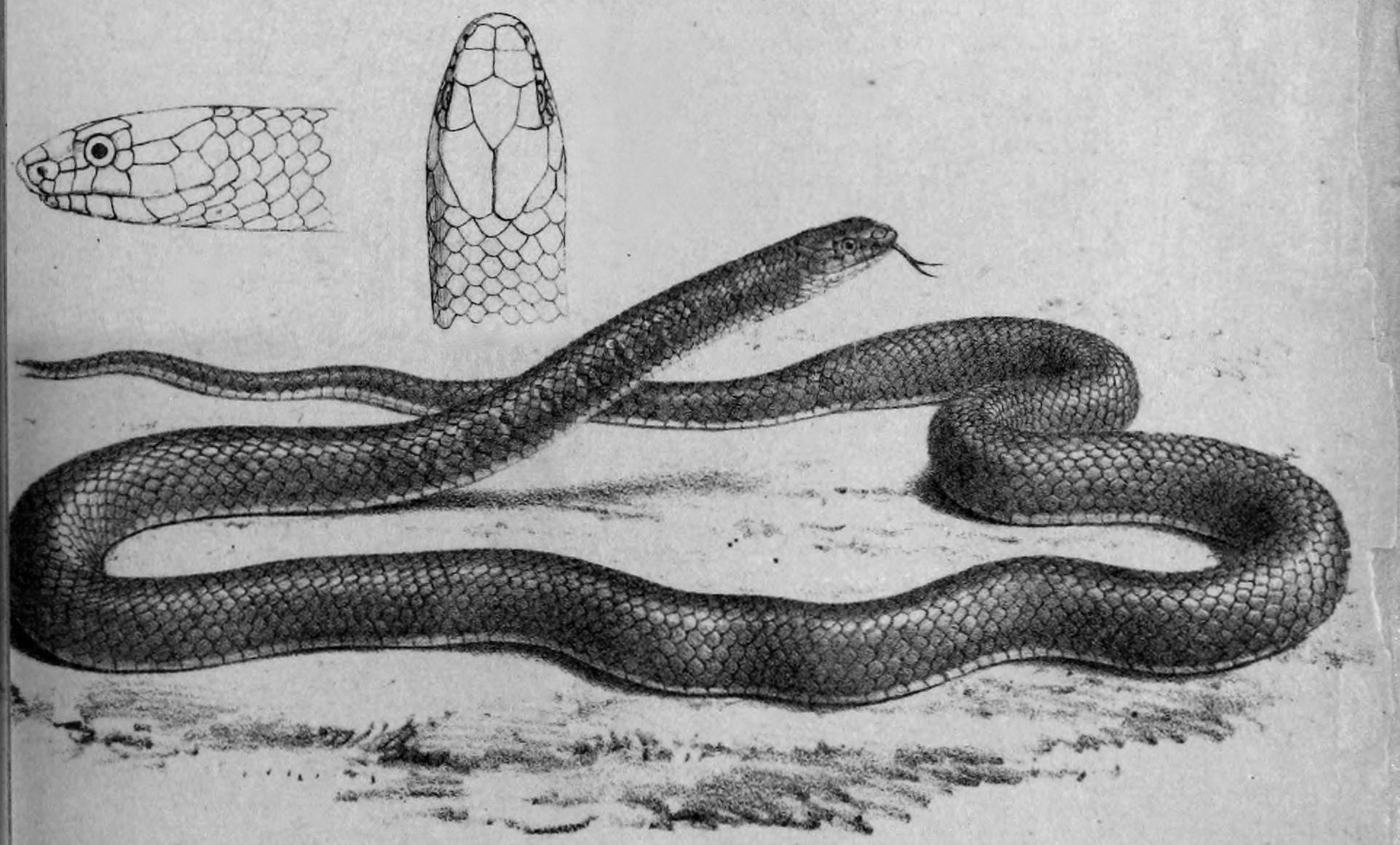 Liopeltis rappi